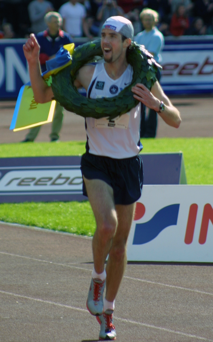 Anders Szalkai vinner Stockholm Maraton 2001